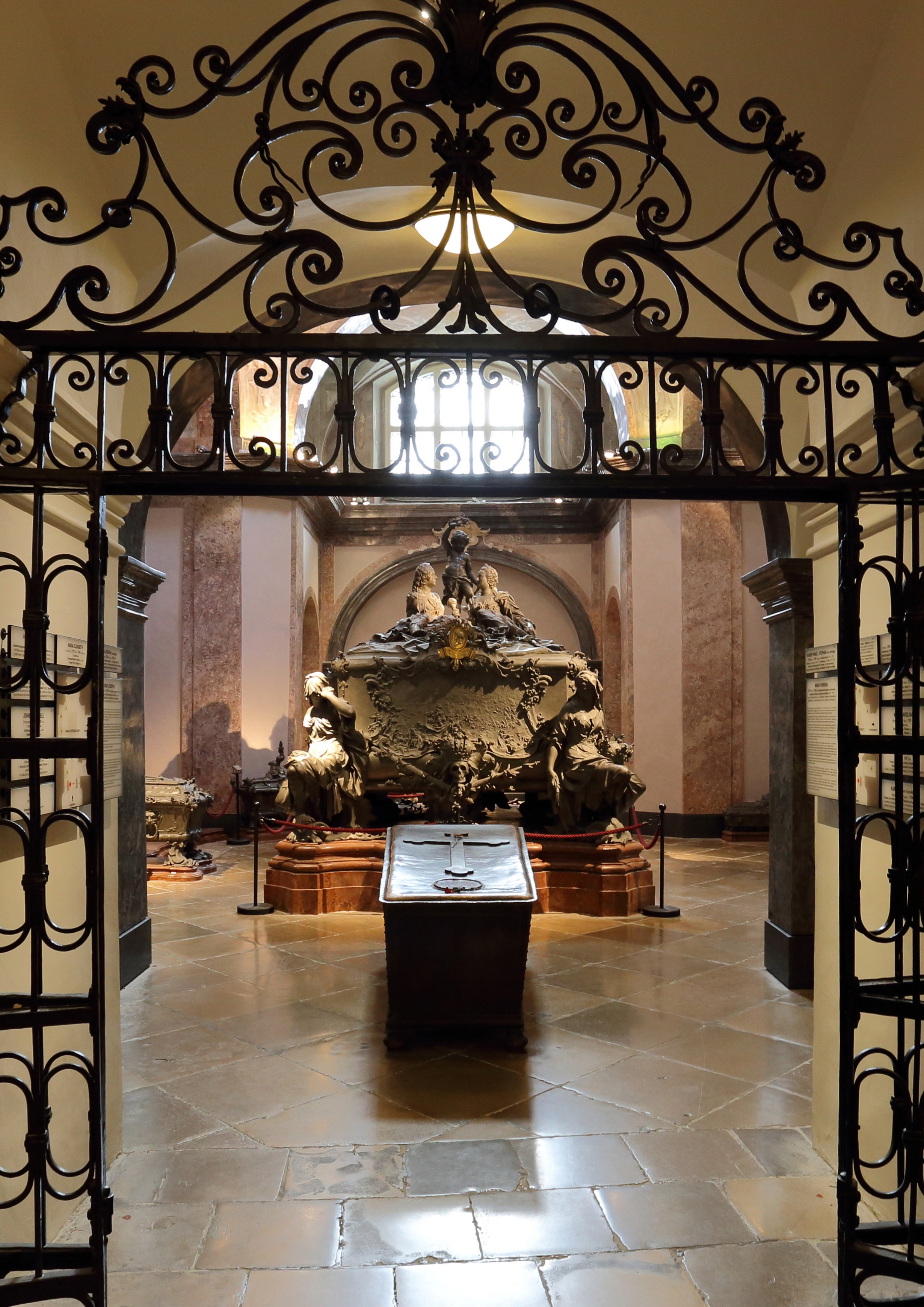 Ostseitiger Eingang zur Maria-Theresia-Gruft in der Kapuzinergruft, Österreichs größte Gruft in Wien. Im Vordergrund der schlichte Sarkophag mit Kaiser Joseph II. und dahinter der Prunkdoppelsarkophag seiner Eltern, Maria Theresia (1717-1780) und Franz I. (1708-1765). Dieser wurde bereits 16 Jahre vor dem Tod der Kaiserin von Balthasar Ferdinand Moll (1717-1785) nach ihren Wünschen gefertigt.